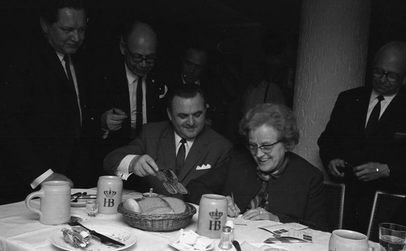 Empfang in der La-Vertr. Bayern sitzend v.l.n.r.: mdB [Franz Josef] Zebisch, Bm [Käte] Strobel [beide SPD]